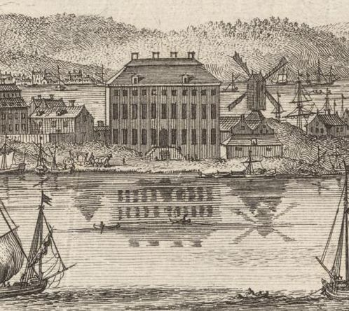 Equile Regium auspicio Regis Caroli XI Holmiæ, in insula a Spiritu Sanctu dicta [Bild] : Anno 1696 affabre exstructum / [Johannes van den Aveelen]